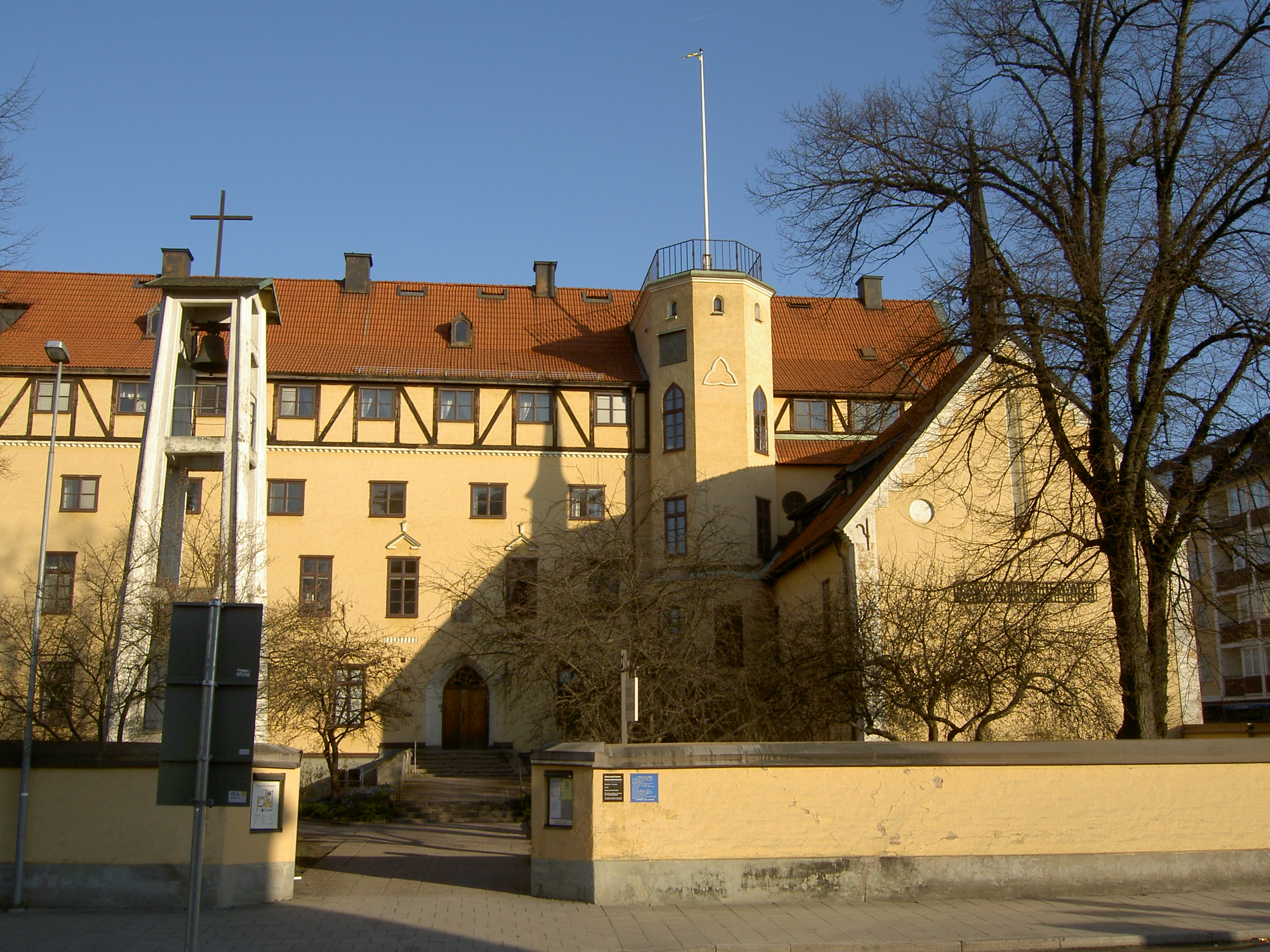 Samariterhemmet